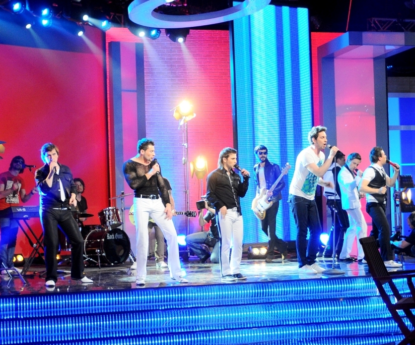 Вокальная группа DukeTime спела совместно с группой "Друга ріка" песню "Фурія" в проекте 95 квартала "Пороблено в Україні"